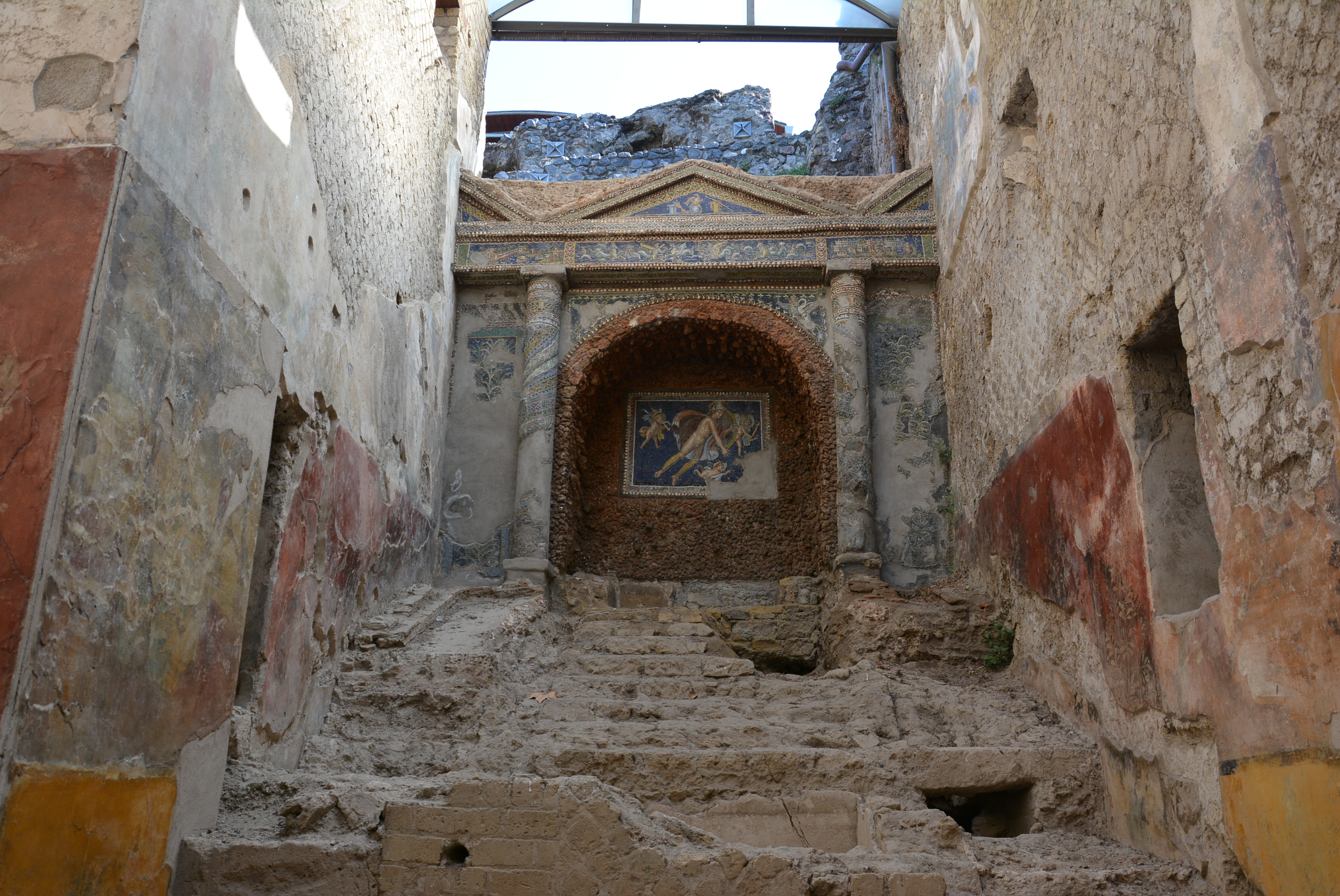 Terme Suburbane - MIBACT This is a photo of a monument which is part of cultural heritage of Italy.